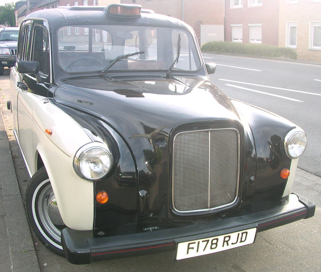 Alsdorf bei Aachen, Austin FX4 (beliebt als Londoner Taxi)